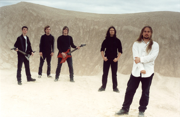 Fotografi på bandet Taleswapper från årgång 2001.